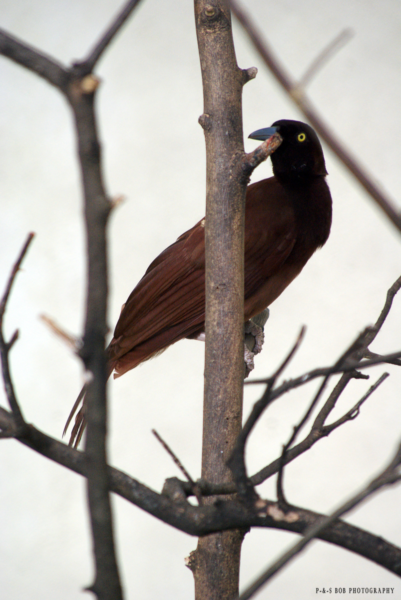 Cenderawasih Kuning Besar (in Malay) at KL Bird Park, Malaysia